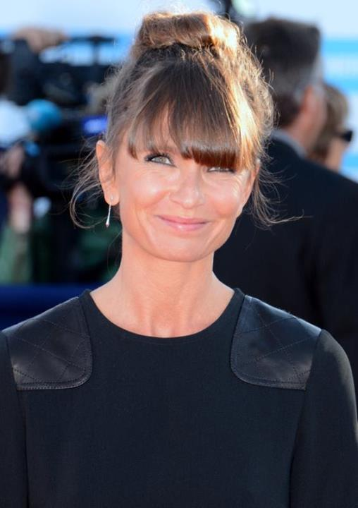 Axelle Lafont au festival de Deauville